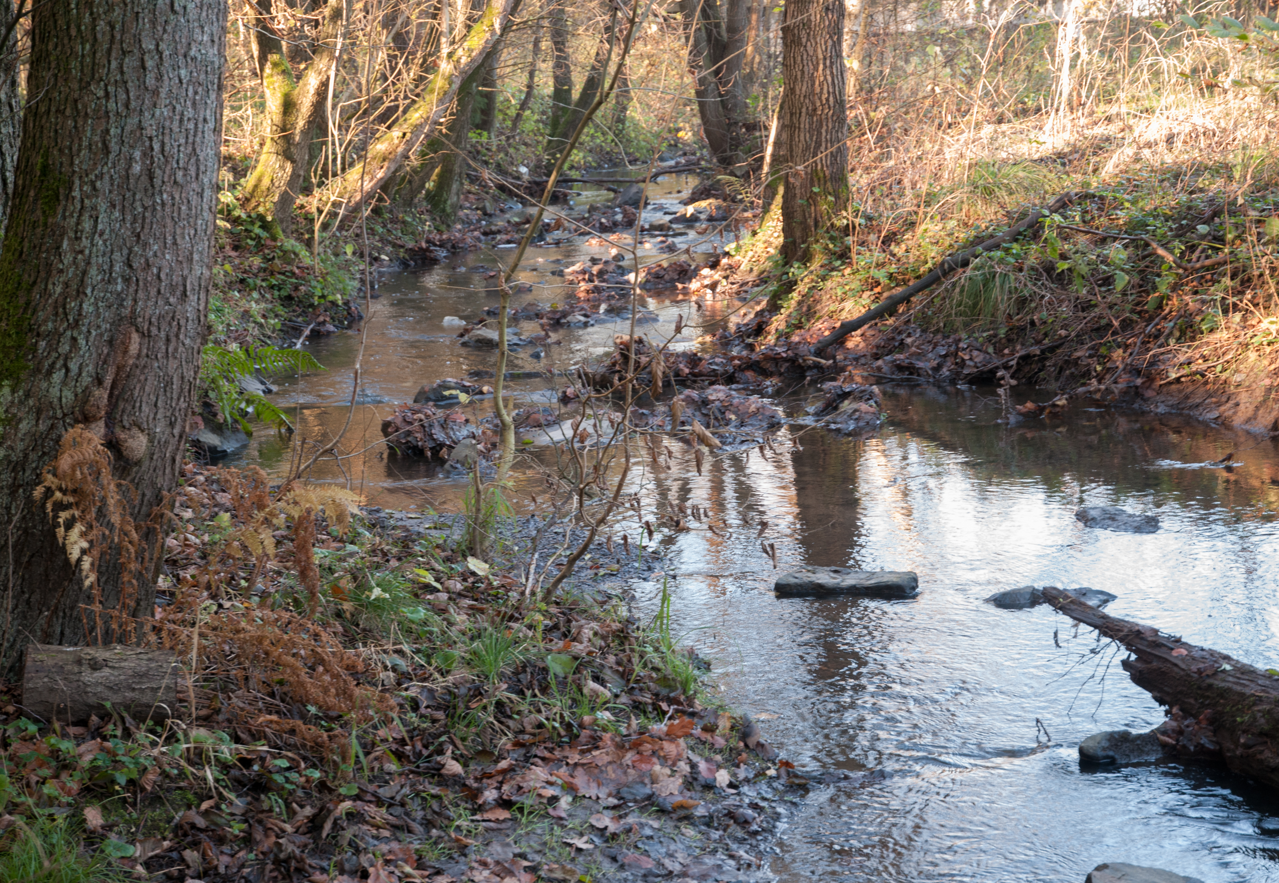 Aupke - Möhne-Seitenarm